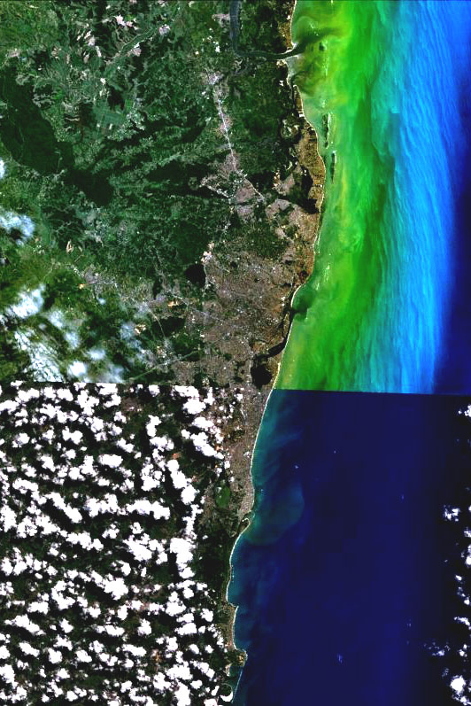 Zona urbana da Região Metropolitana do Recife